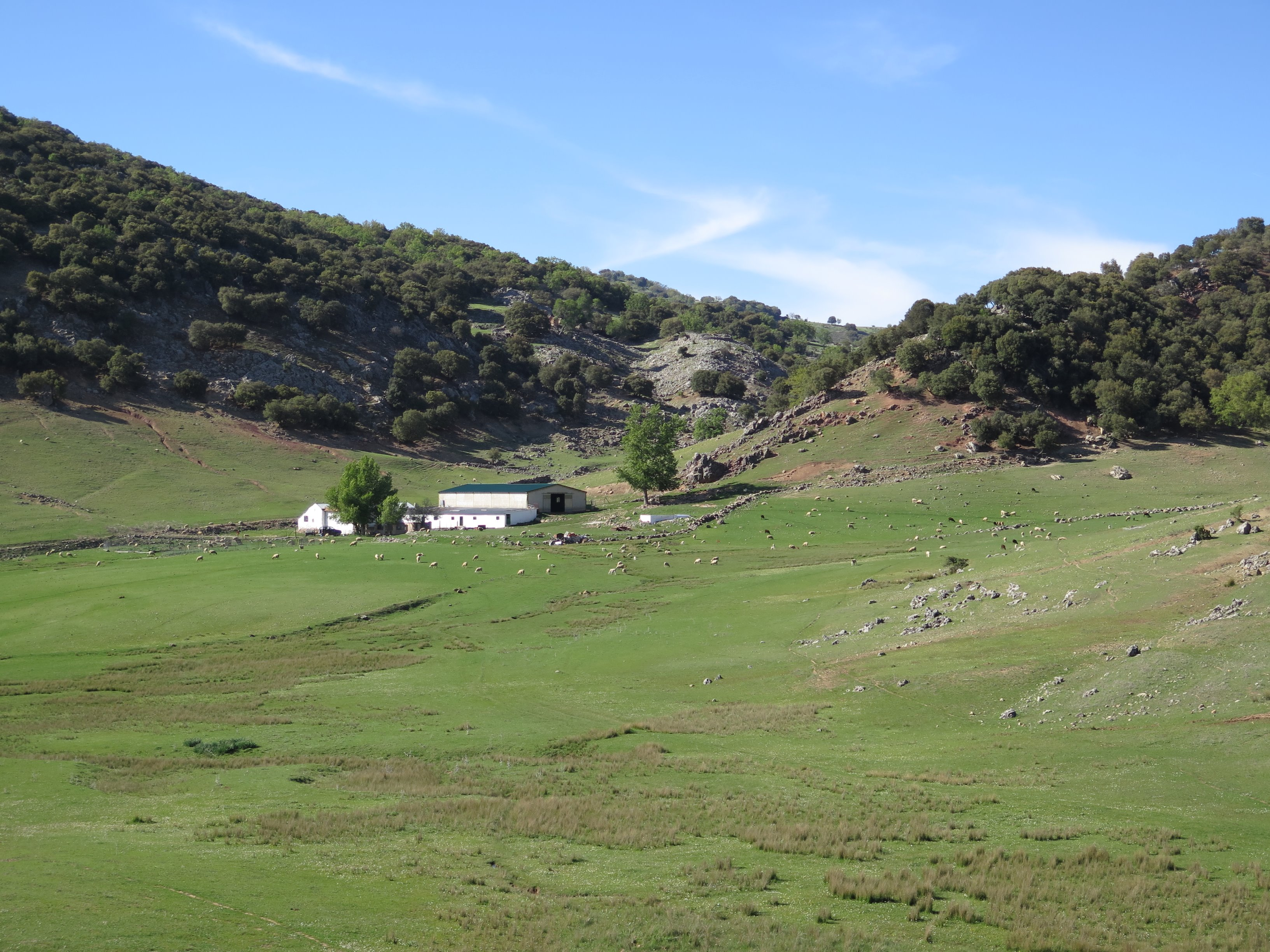 Vista del cortijo de la Zarzuela, término municipal de Valdepeñas de Jaén, comarca de la Sierra Sur.